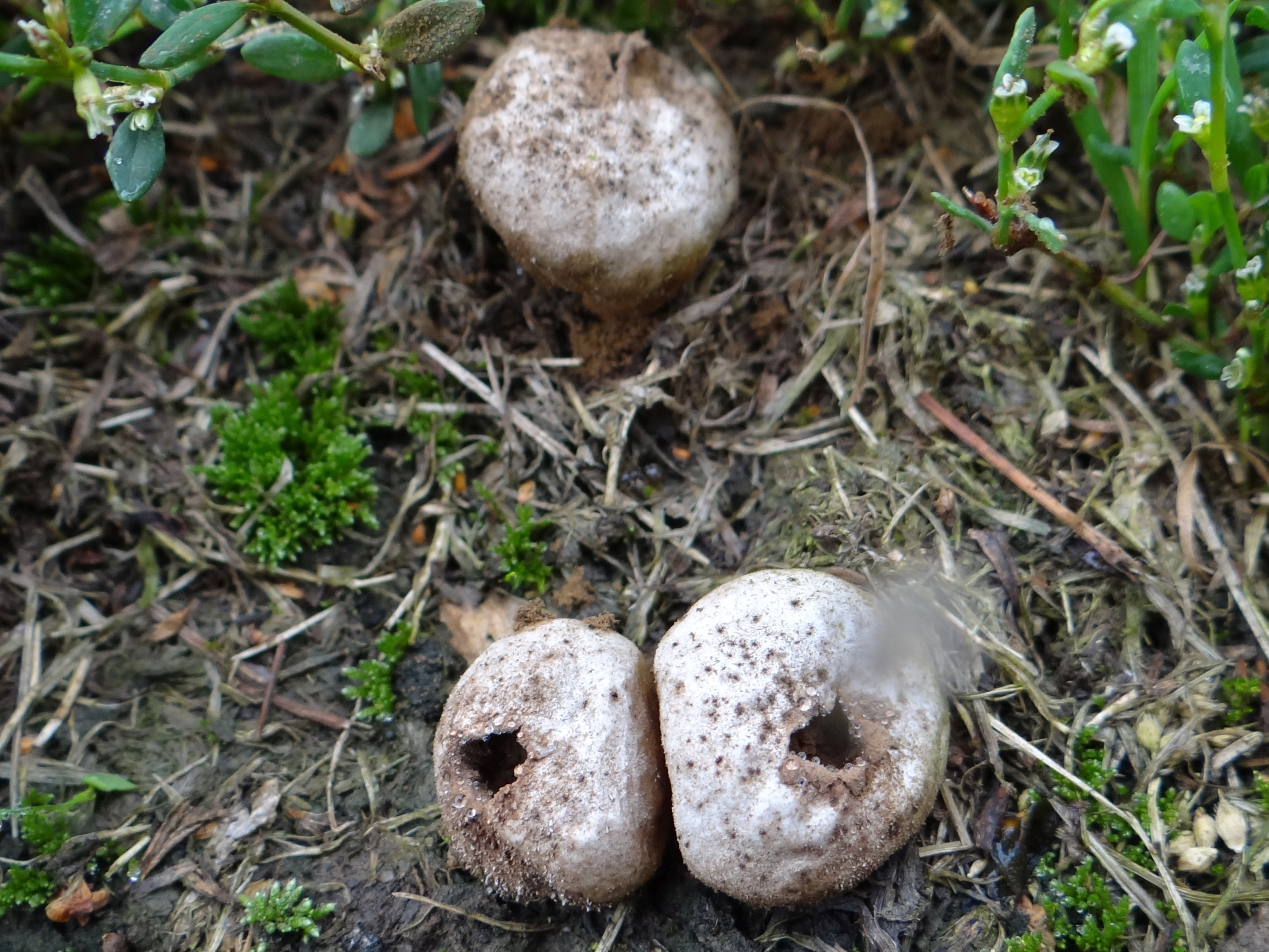 Bovista aestivalis (location: Poland,Beskid Wyspowy, Mszana Dolna, Czarny Dział)